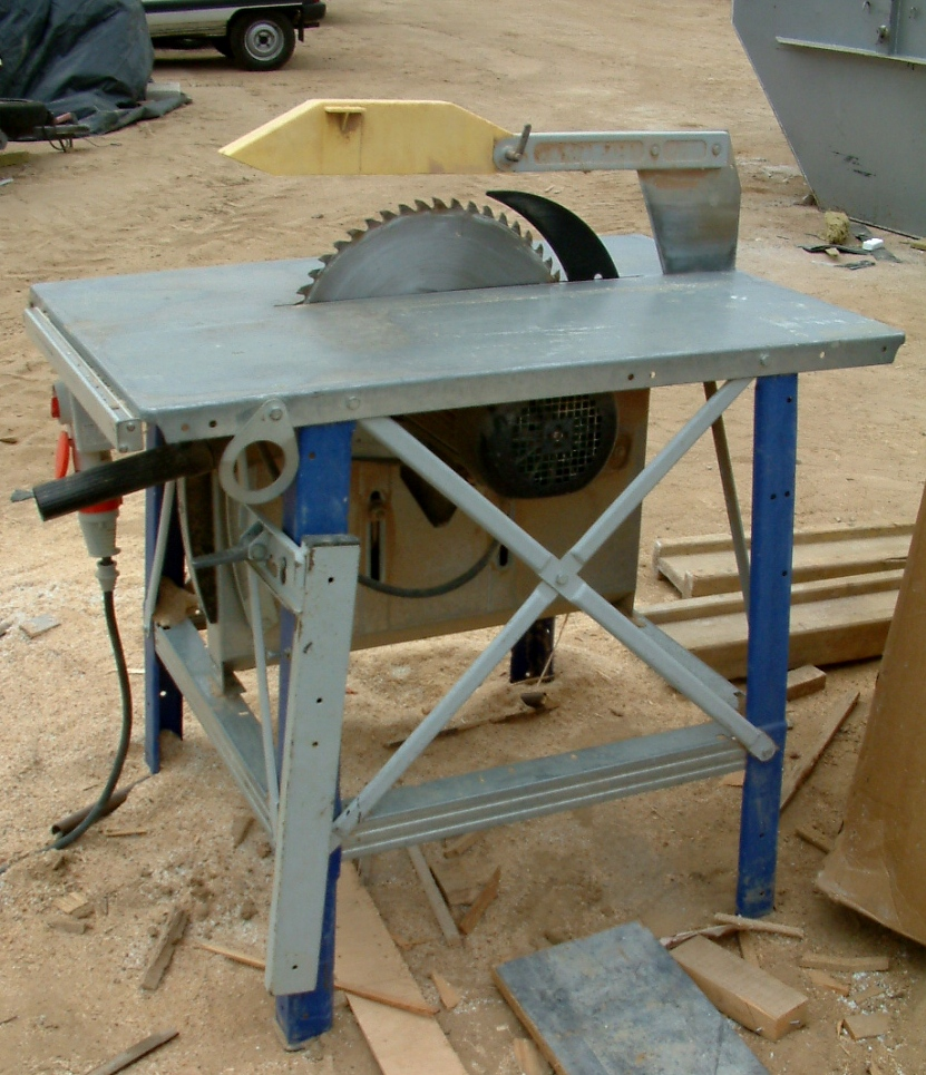 Tischkreissäge mit Spaltkeil (schwarz, hinter dem Sägeblatt)